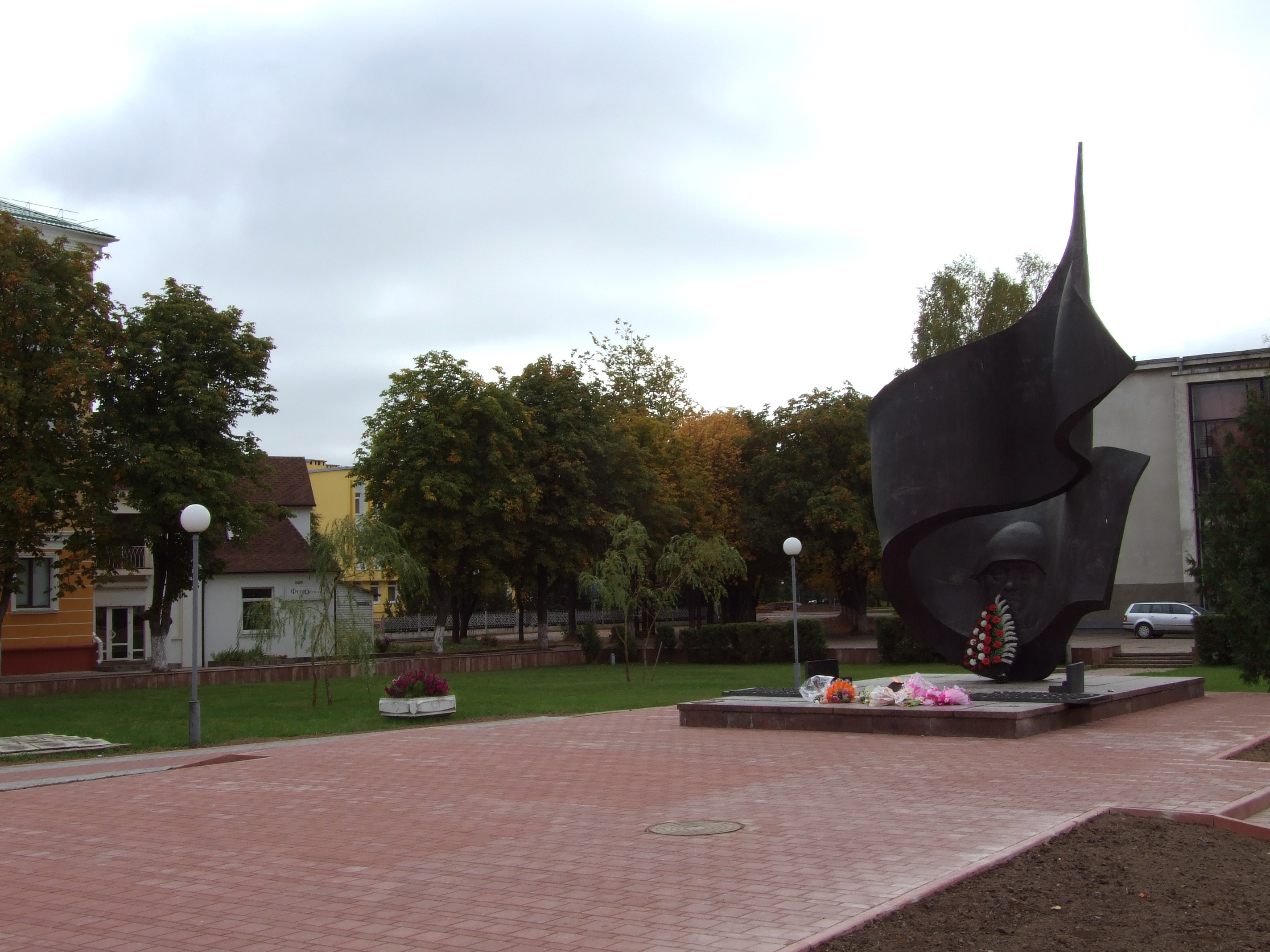 Беларуская (тарашкевіца): Помнік жаўнерам і партызанам, якія вызвалялі г. Баранавічы ад нямецка-фашысцкіх захопнікаў 8 ліпеня 1944 г. This is a photo of Belarusian heritage monument. Reference number: 113Д000024 ( WLM)